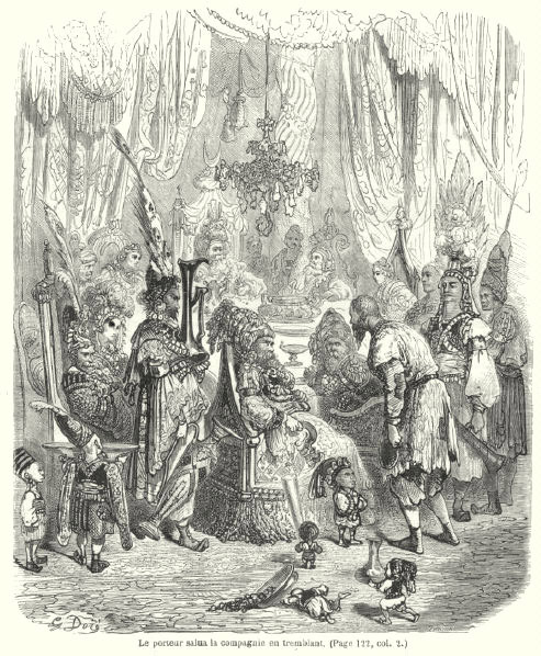 gravure